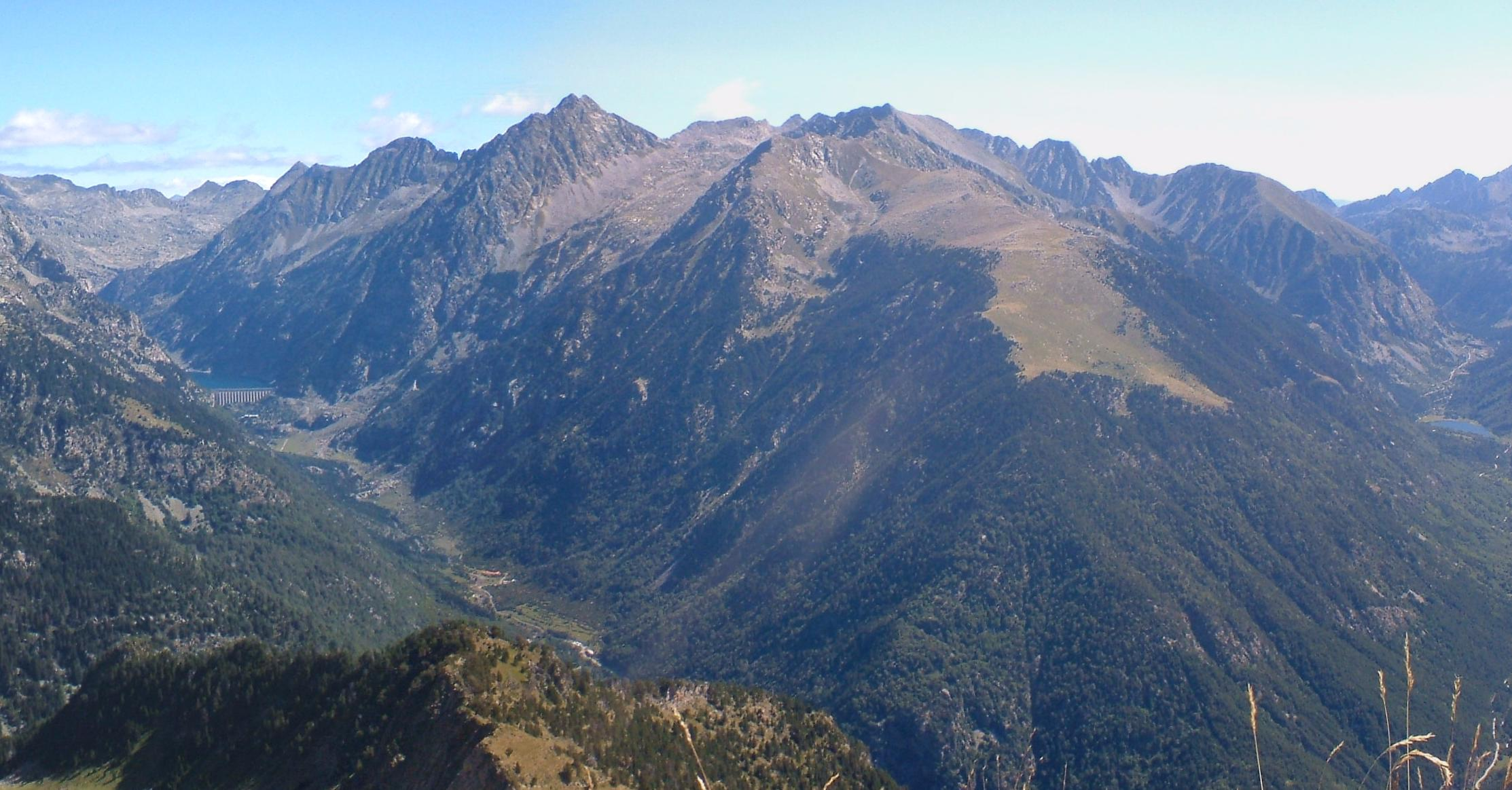 Riba dreta de Ribera de Caldes; vista des de l’Aüt; Vall de Boí, Alta Ribagorça, Catalunya